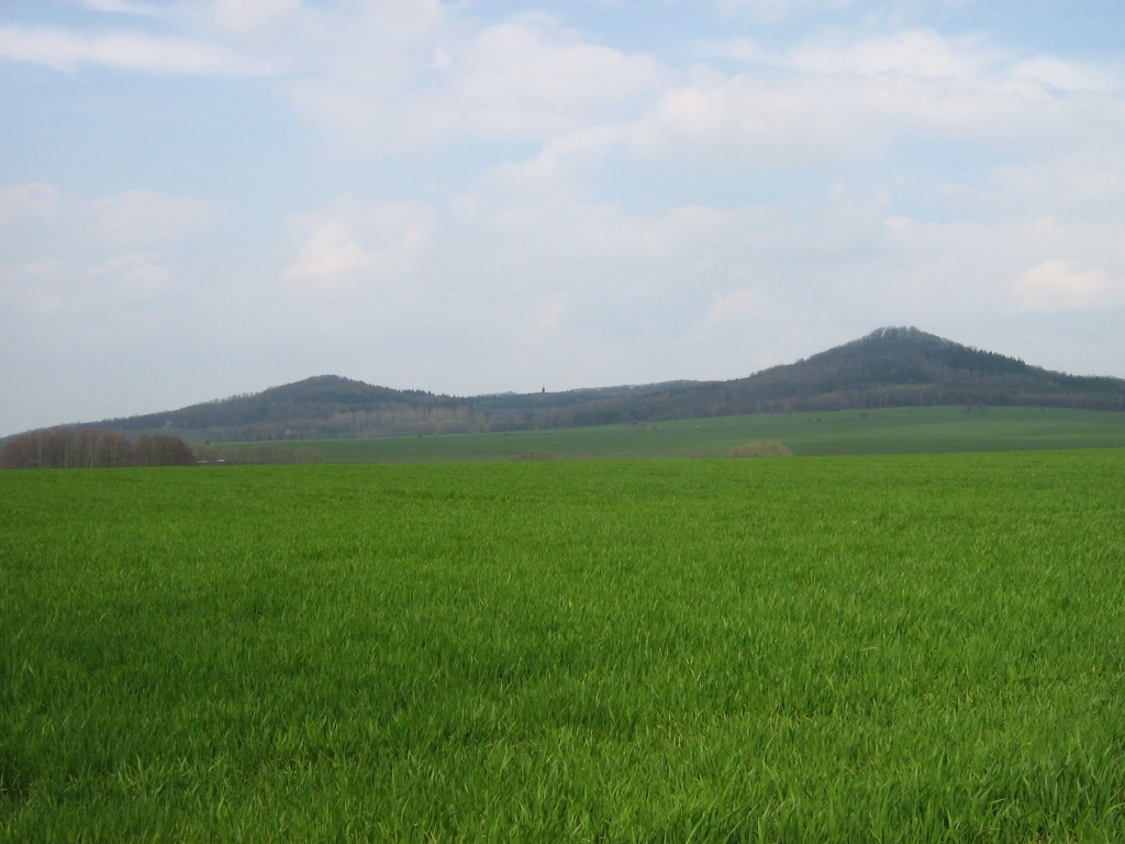 Der Rotstein.